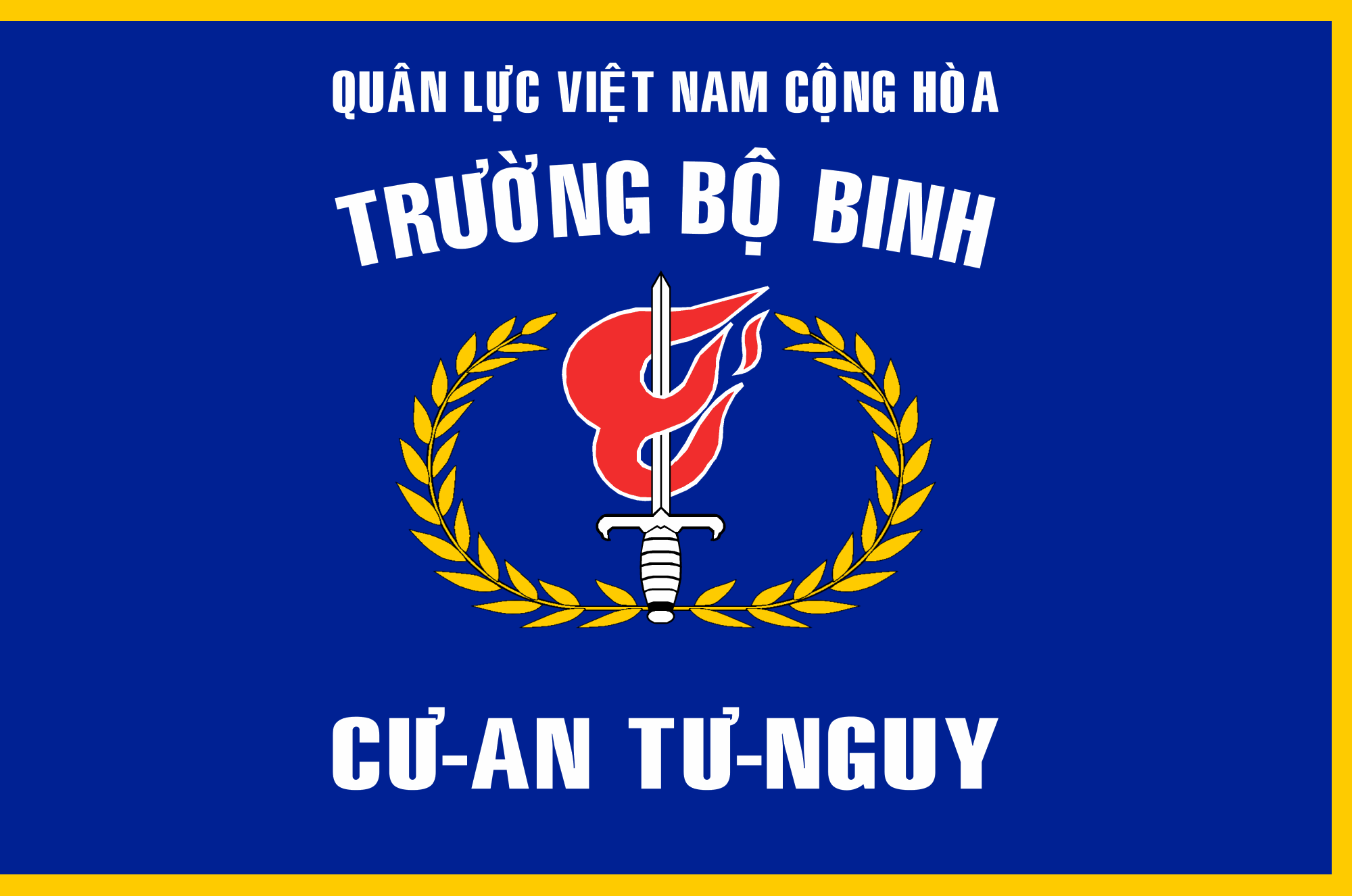 The flag of Thu Duc Infantry School (Trường Bộ binh Thủ Đức), used since 1964 to 1975.